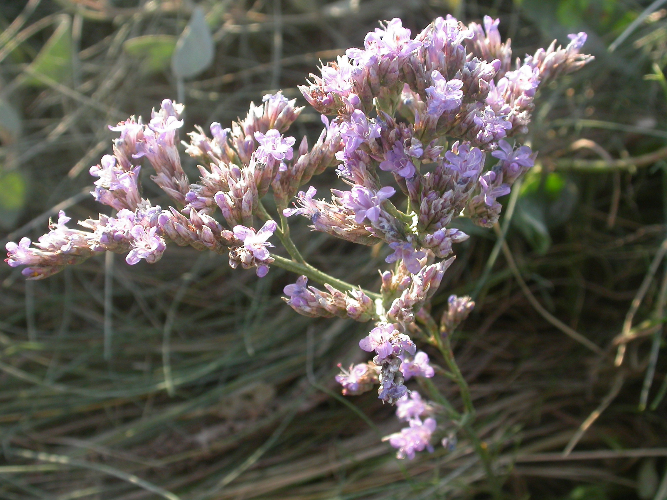 Limonium vulgare Baie d'Authie (Somme), France